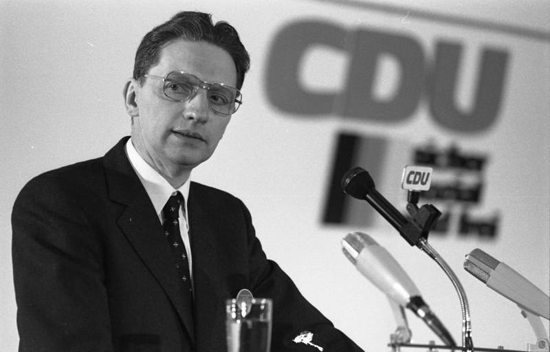 03.02.1983 Friedenskongreß der CDU im Konrad-Adenauer-Haus, Bonn.